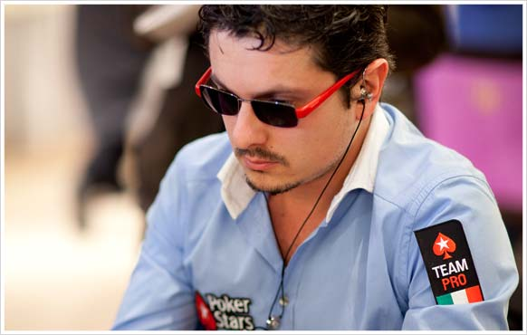 Luca Pagano